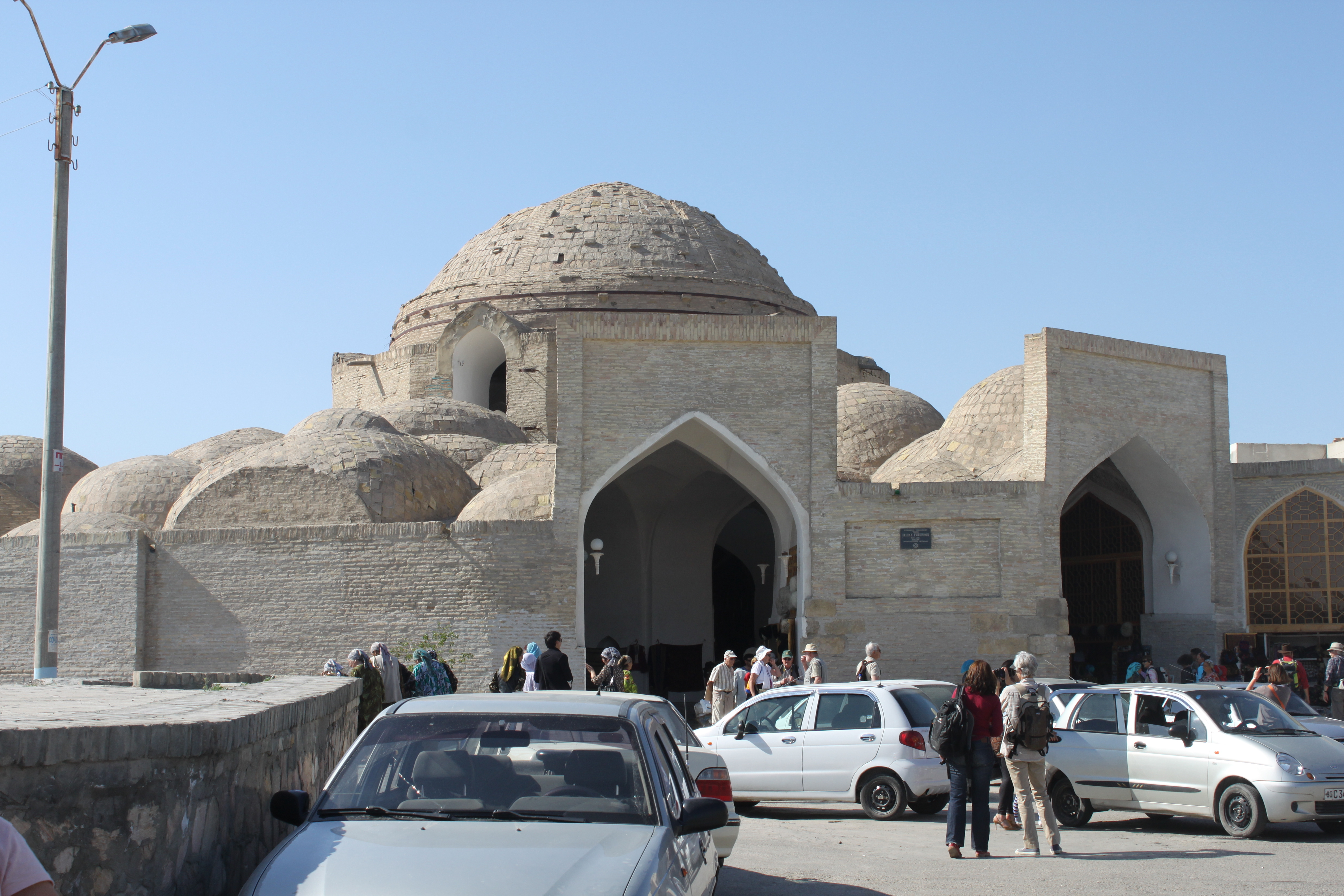 Le Tak-i -Tilpak Furushon à Boukhara